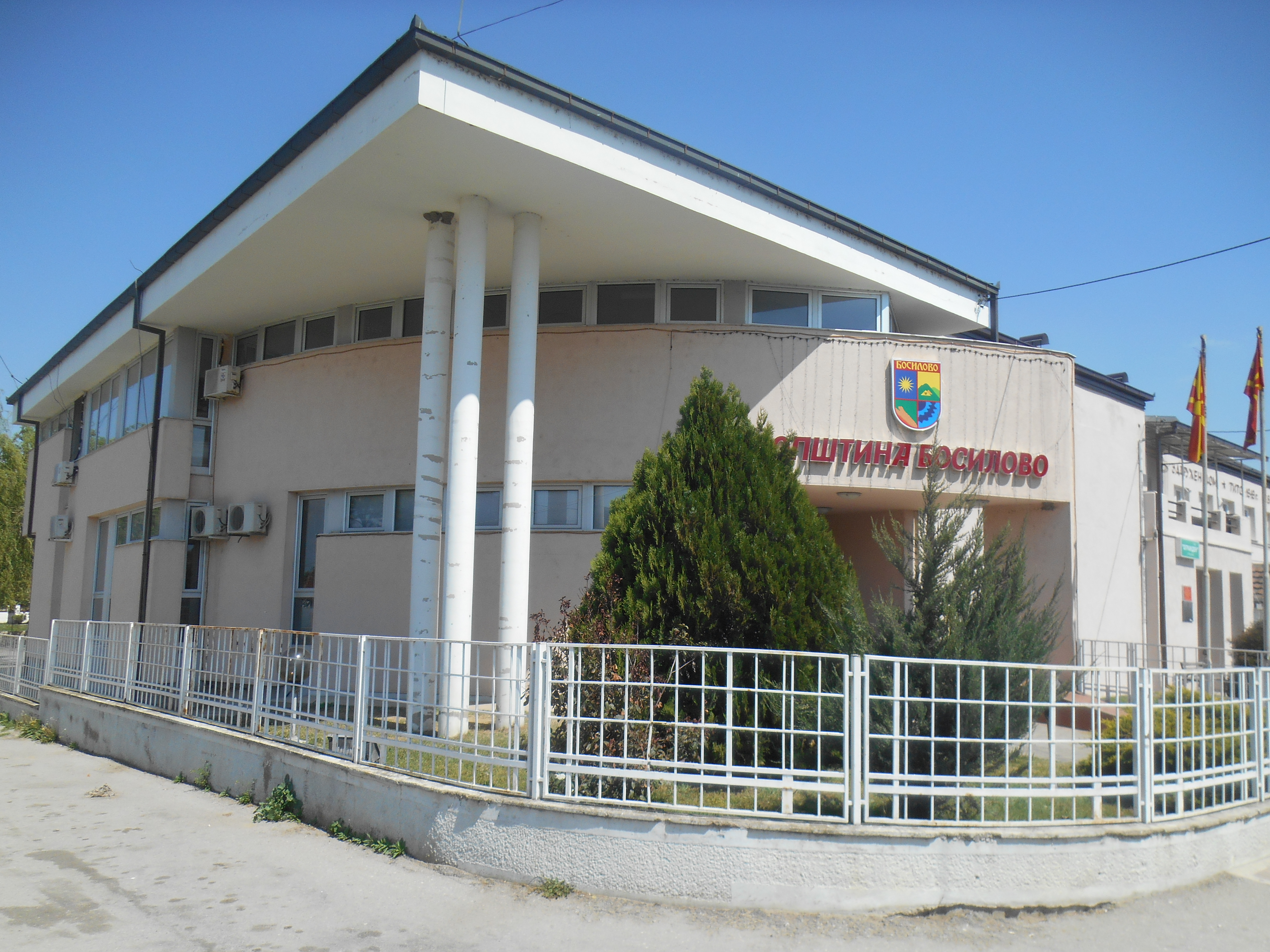 Административна зграда на Општина Босилово